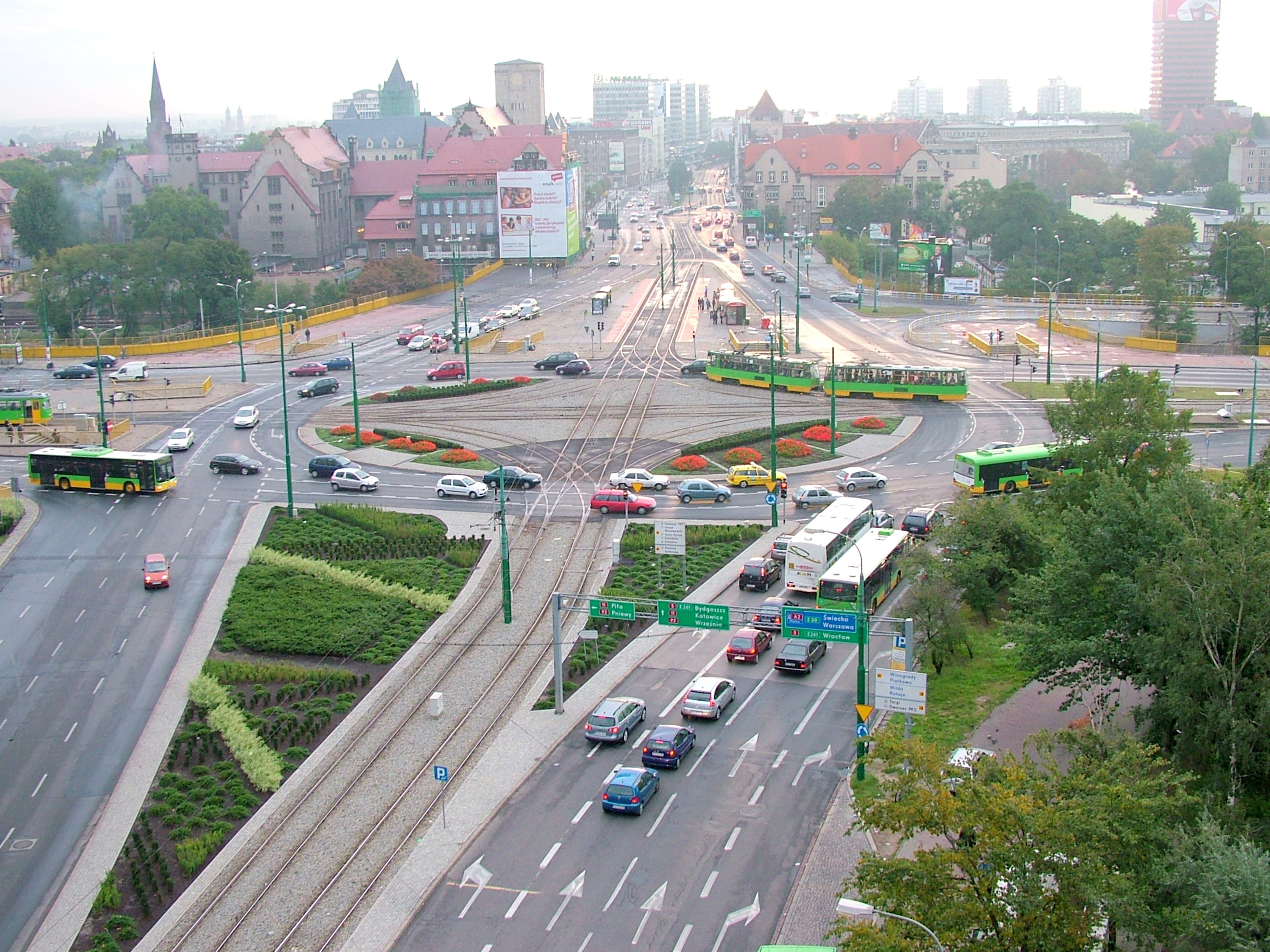 Rondo Kaponiera, Poznan